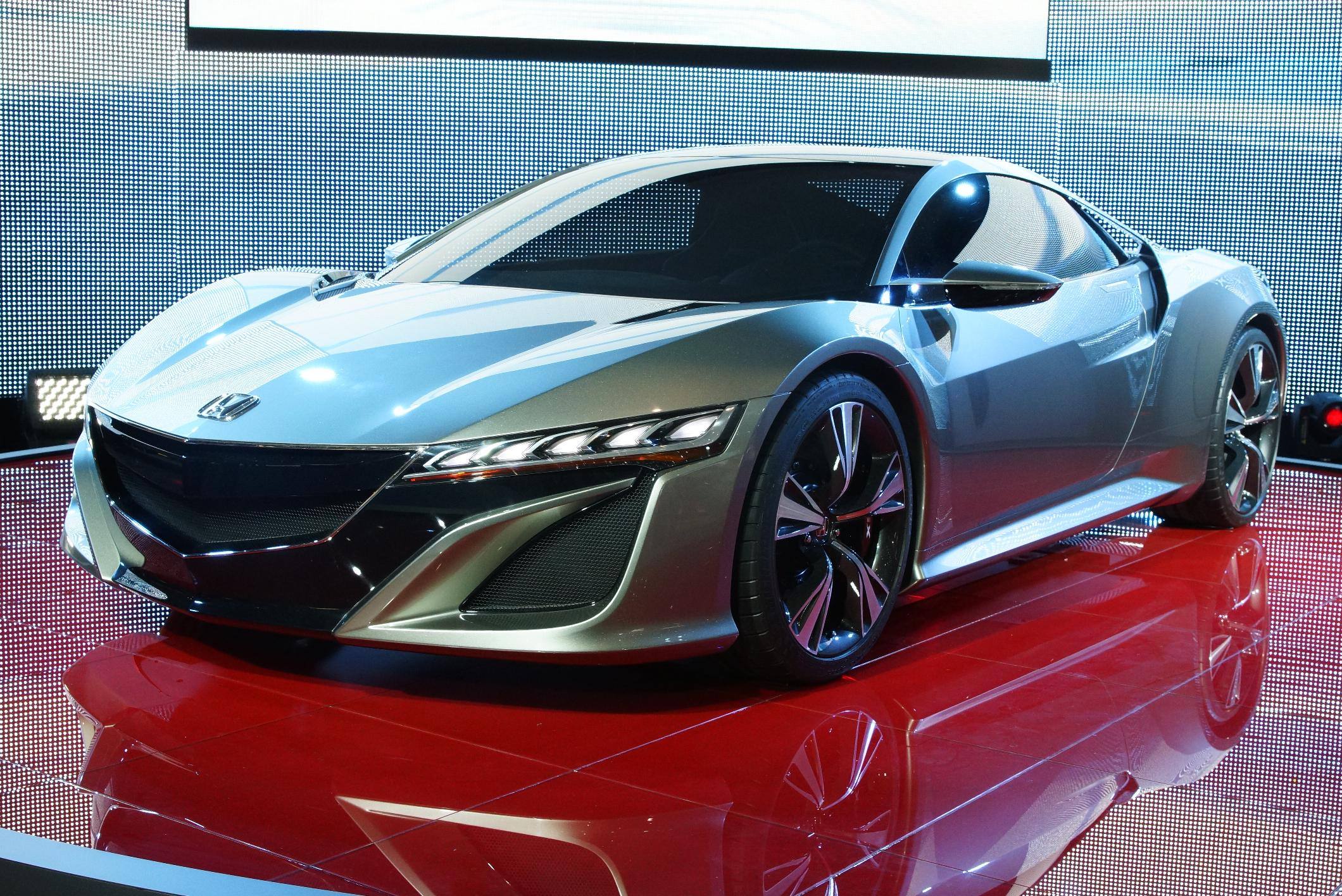 Il concept Honda NSX esposto al salone dell'auto di Ginevra nel 2012